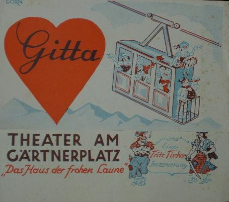 Programmheft 1942 Thetaer am Gärtnerplatz